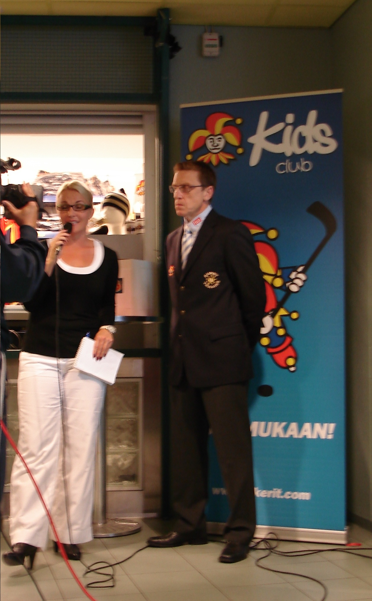 Glen Hanlon Laura Ruoholan haastattelussa 13.9.2008, jolloin Hanlon valmensi Helsingin Jokereita.